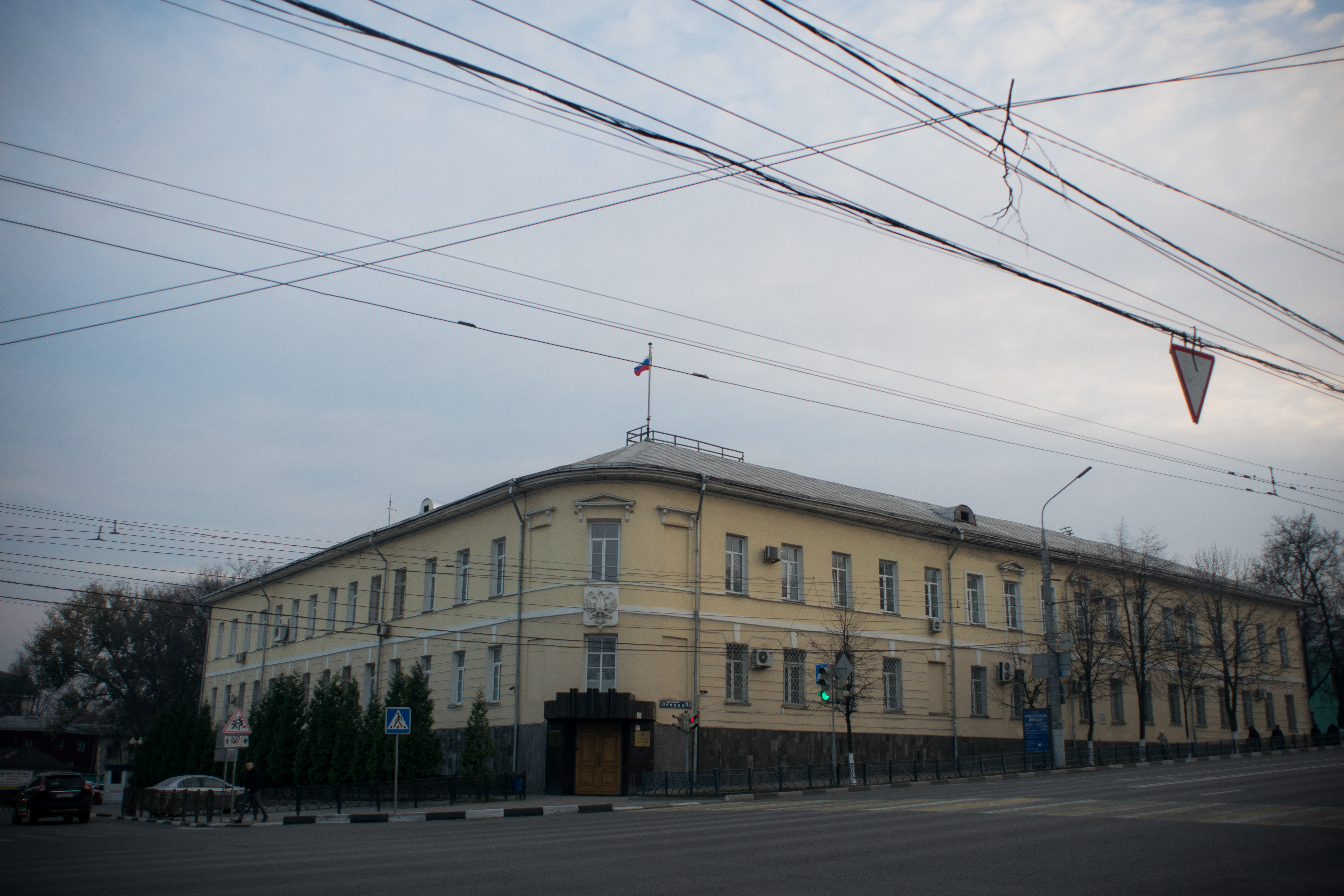 Присутственные места и окружной суд (Тульская область, Тула, проспект Ленина, 45, лит. А, А1, Б, Б1 / Пушкинская улица))